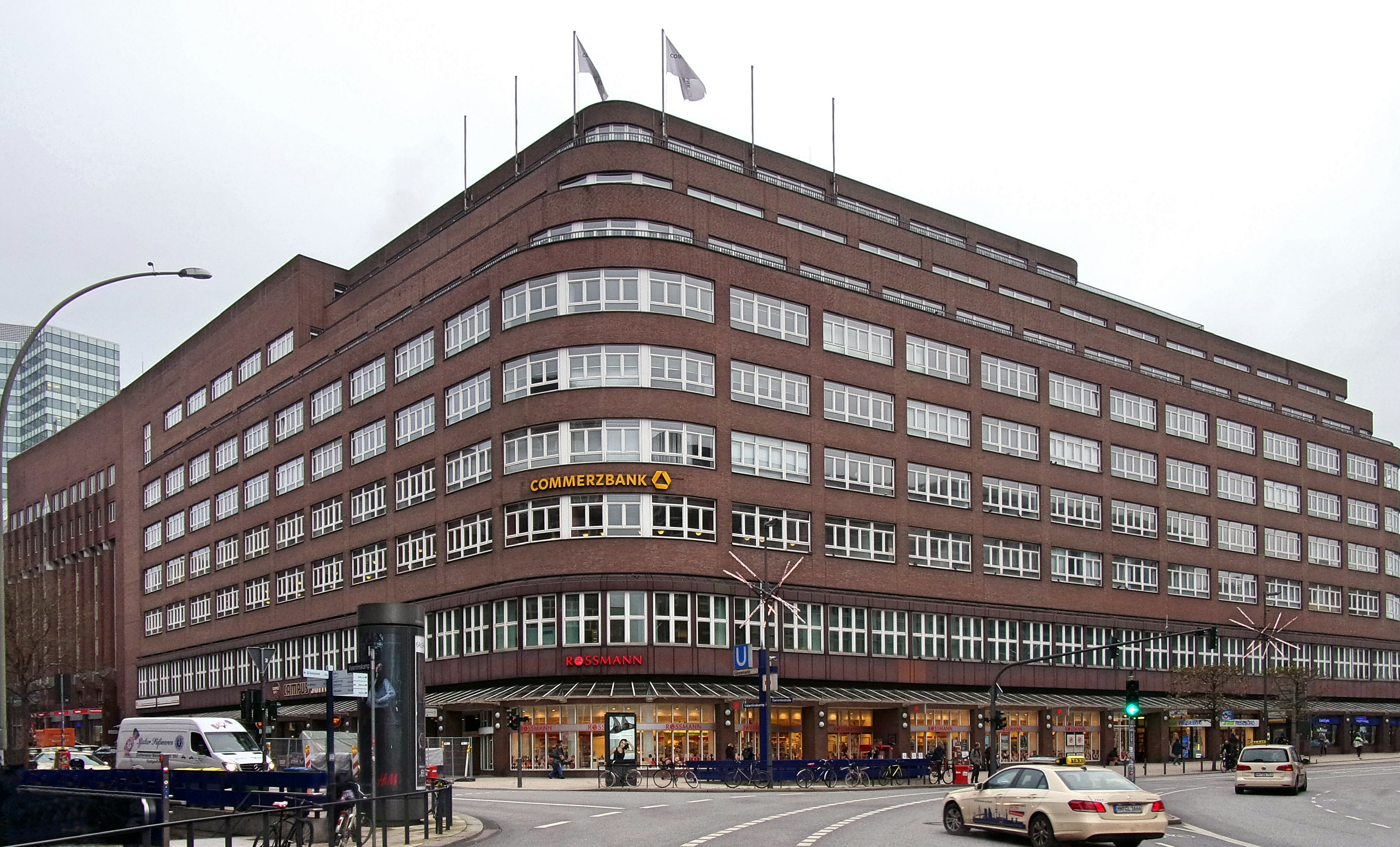 Das Deutschlandhaus mit Ansicht an der Ecke Valentinskamp (links) und Dammtorstraße (rechts). Das Gebäude wurde 1929 erbaut. In den Medien wurde bereits über Pläne für einen möglichen Abriss und anschließender Neubebauung berichtet. Foto Ende November 2017.